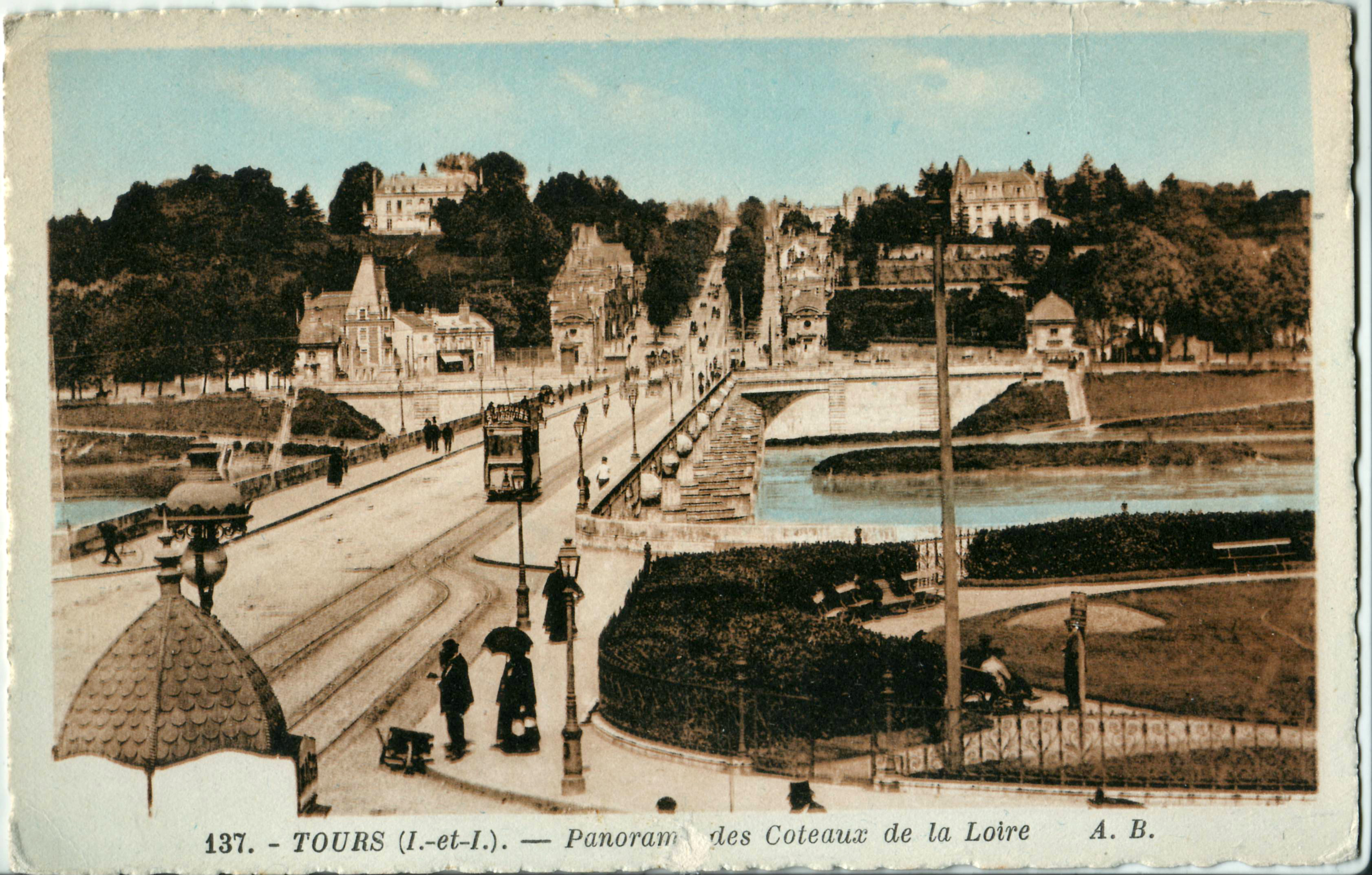 Carte postale ancienne éditée par AB, n°137 :TOURS - Panorama des Coteaux de la Loire